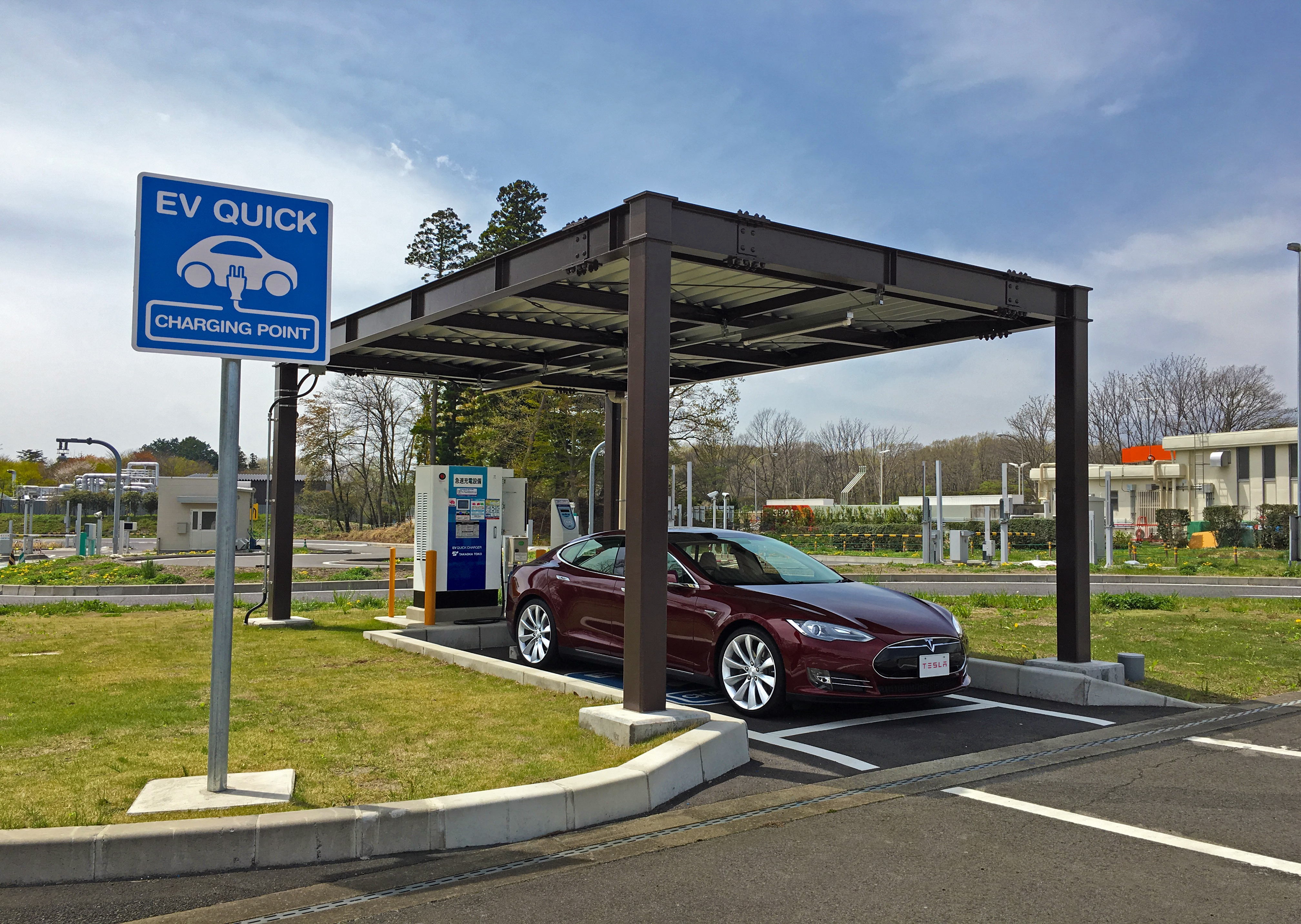 東北自動車道 那須高原SA CHAdeMO充電器